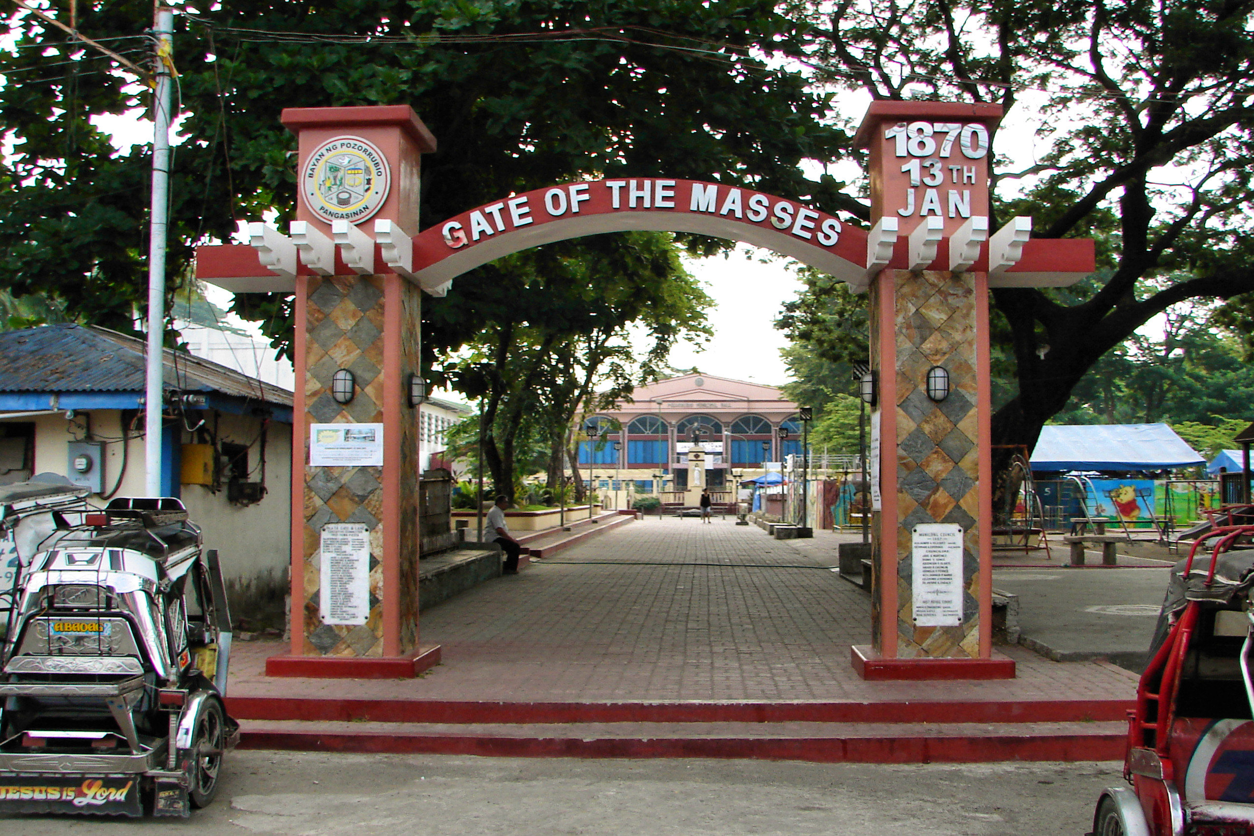 Pozorrubio, Pangasinan, Philippines